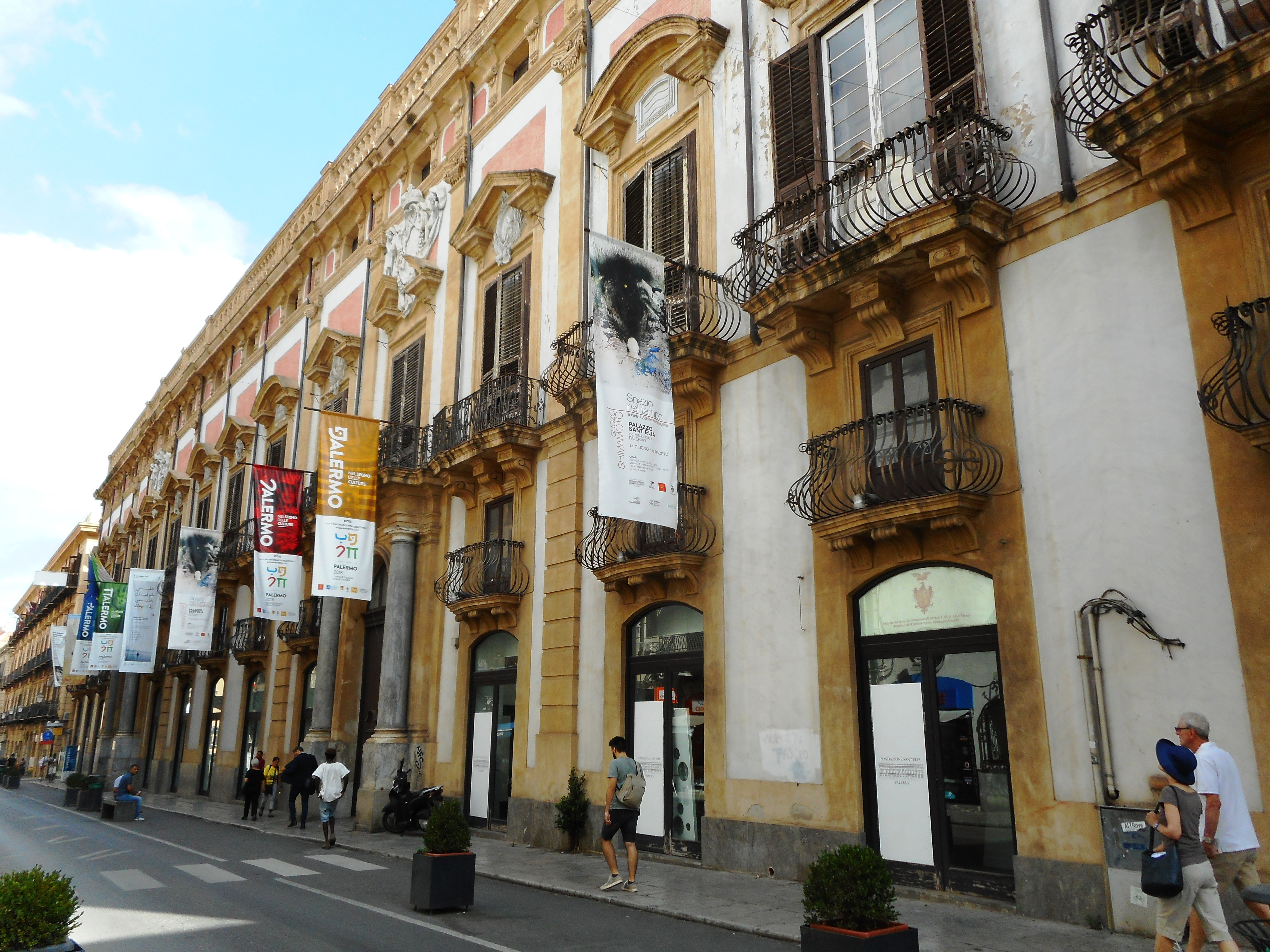 Facciata di Palazzo Sant'Elia su via Maqueda